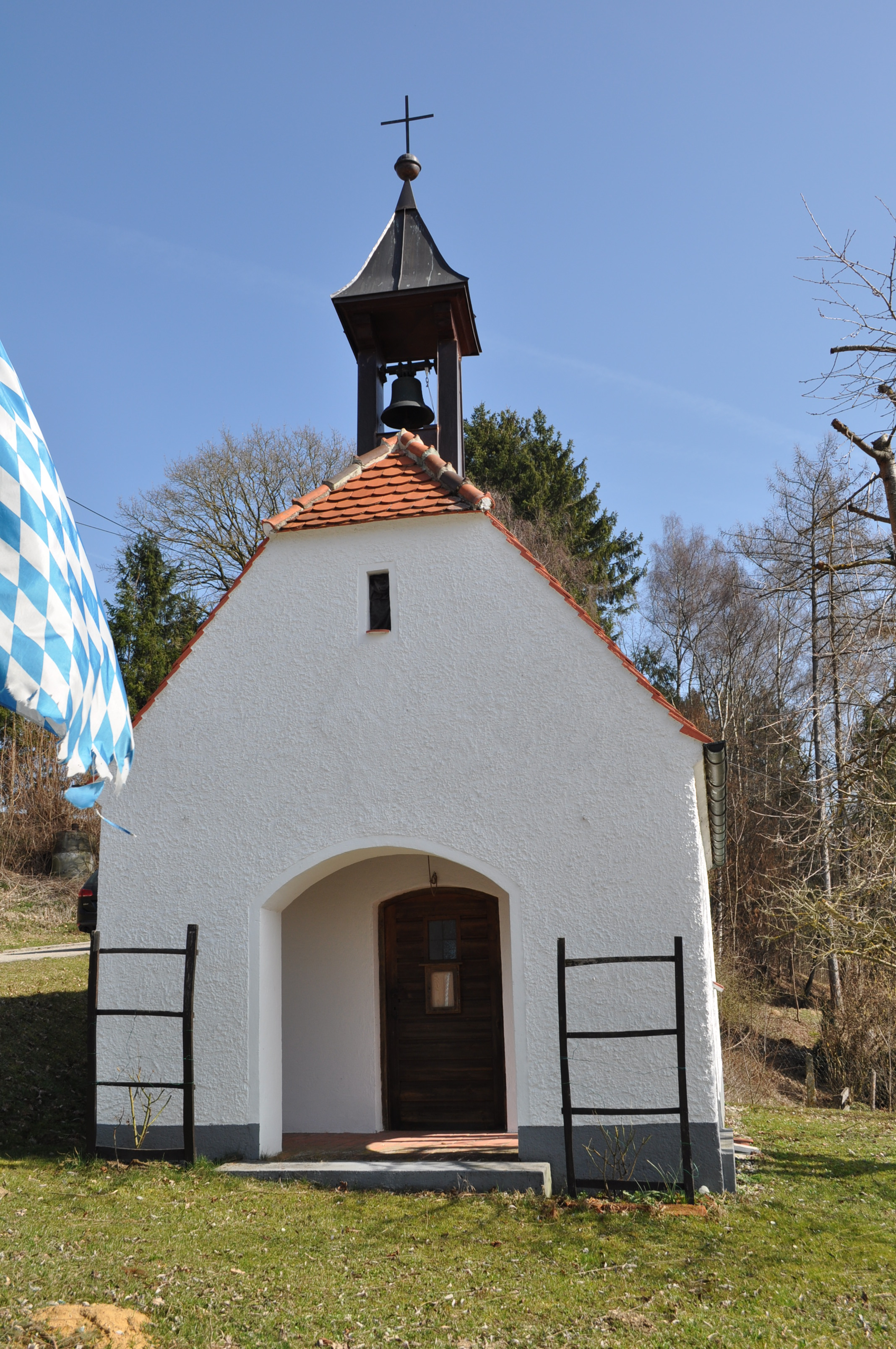 Kapelle in Mehrenstetten Ortsteil von Haldenwang (Schwaben)